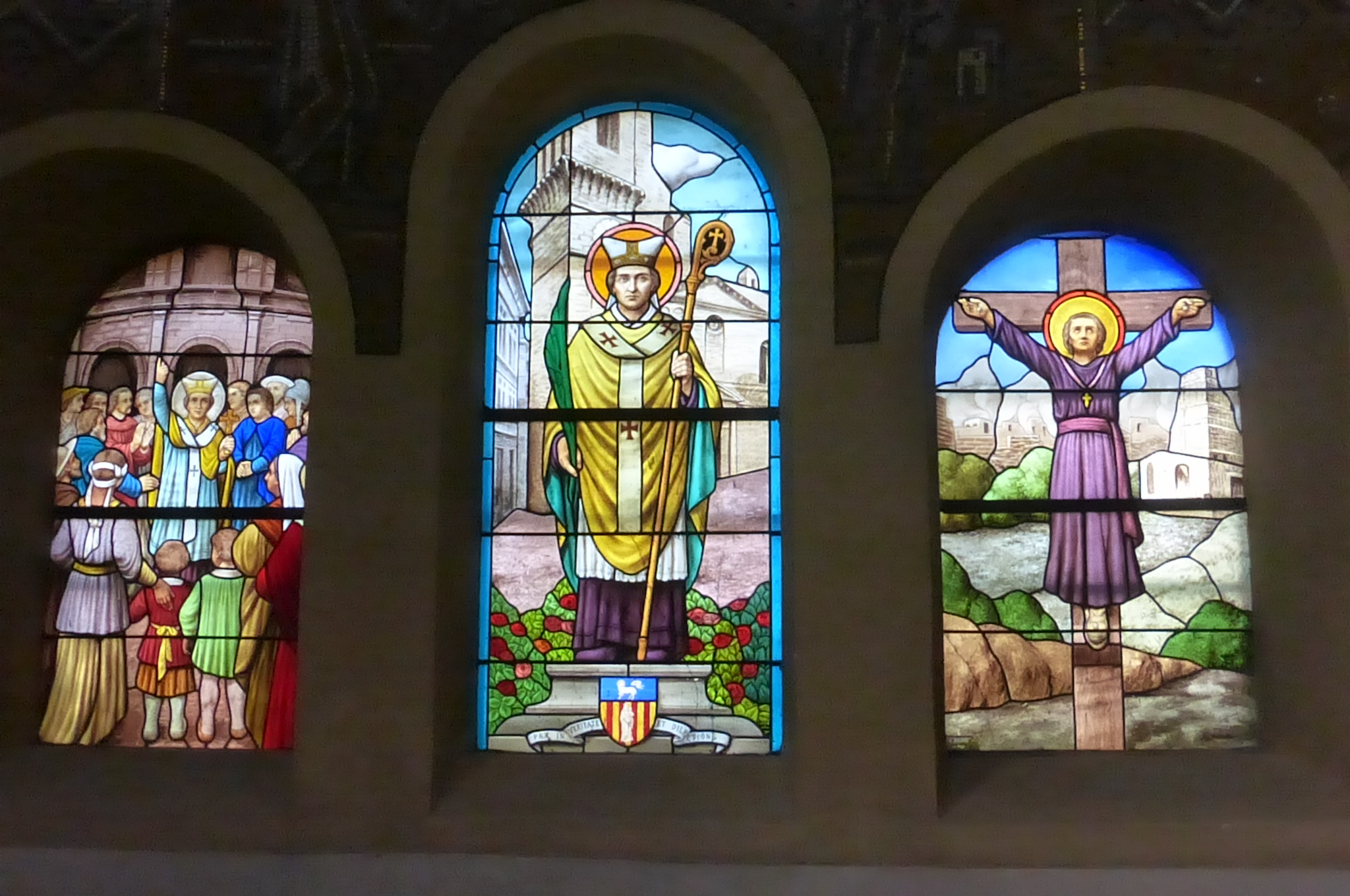 vitrail triptyque Saint Félix église Notre Dame des Enfants Nîmes Beausoleil